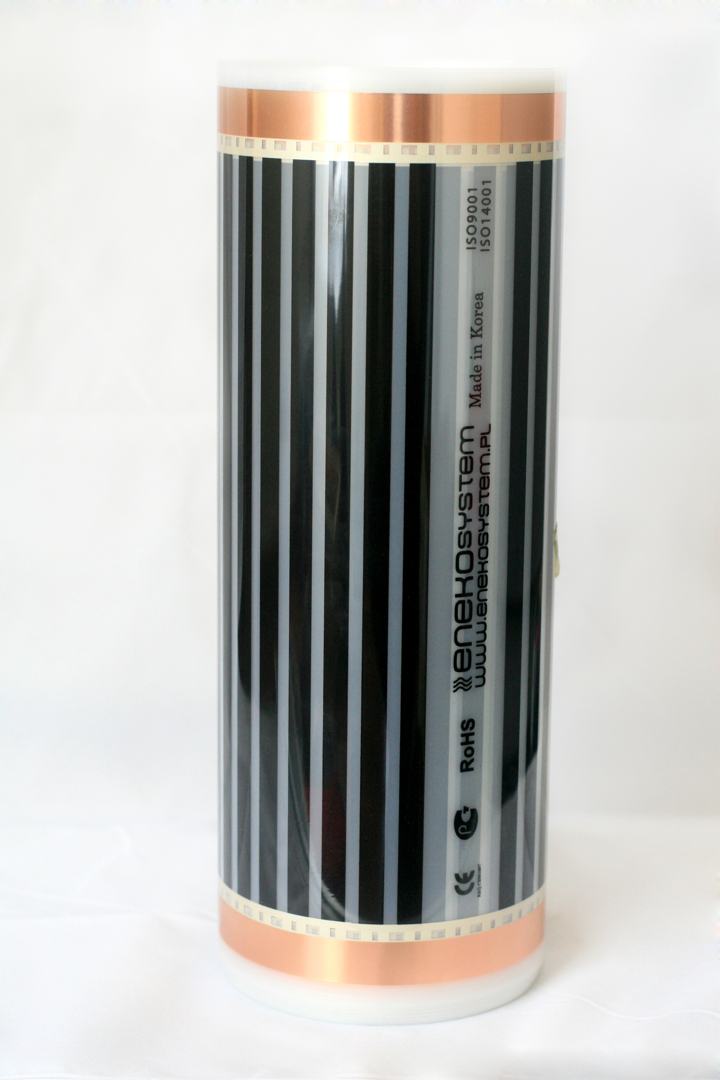 Folia grzewcza AC w rolce